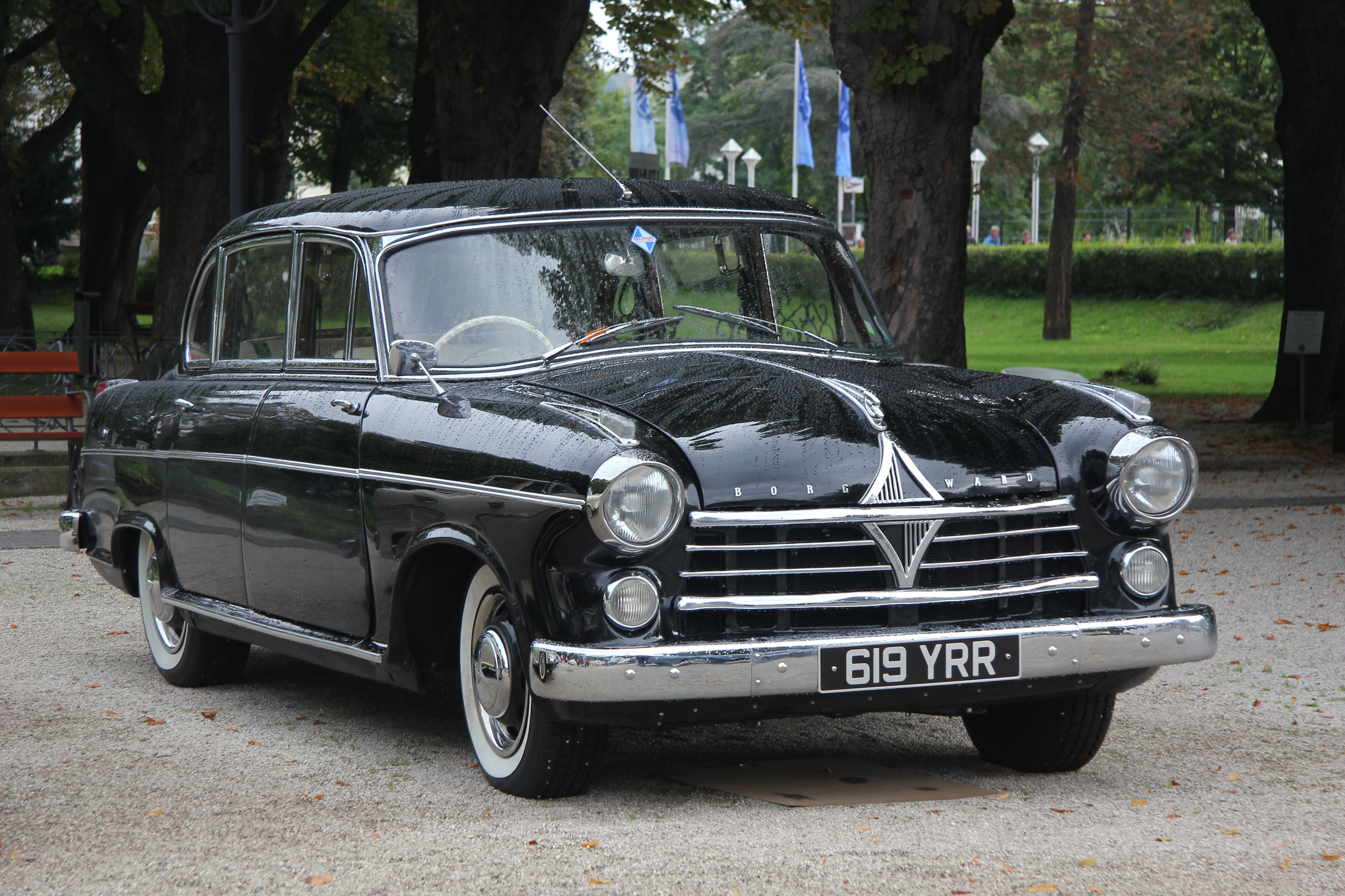 Borgward Hansa 2400 II, 345 Stück gebaut von 1955 bis 1958 (Kennzeichen des Fahrzeugs verändert)